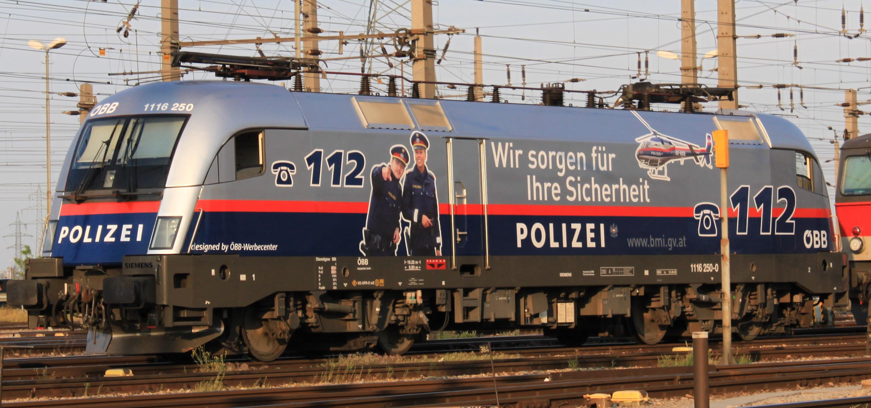 ÖBB 1116 250 mit Polizei-Sonderlackierung